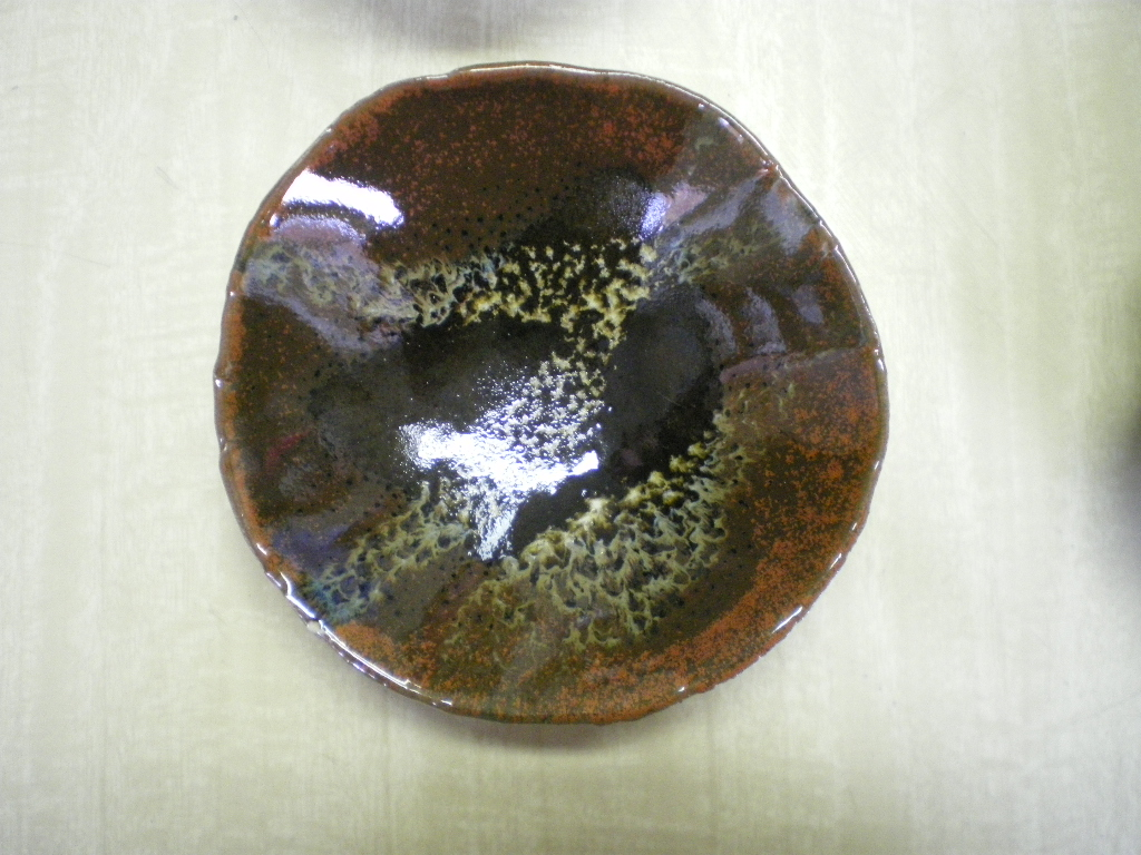 Sur cette coupelle, le tenmoku constitue une base très foncée et riche en fer. Le rouge de fer de la seconde couche, plus vermillon, révèle le tenmoku par transparence, plus ou moins selon les zones. Il se forme des îlots de bruns moyen à foncé. Cette combinaison décline tous les rouges/bruns.